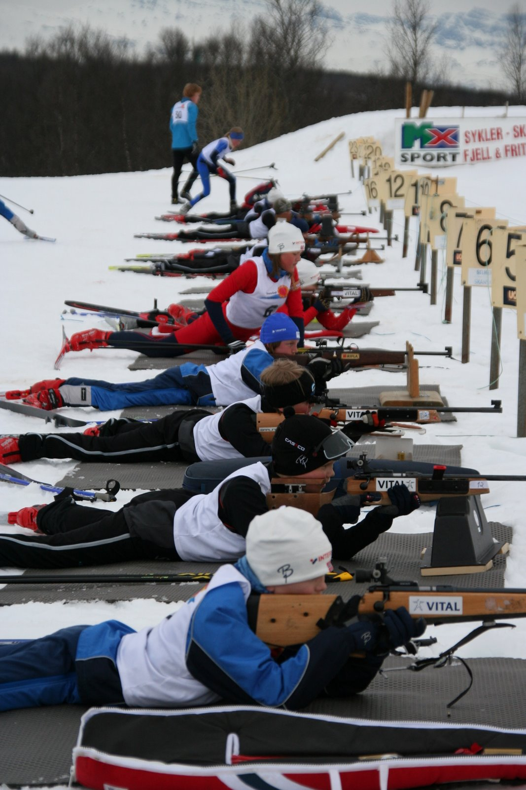 Forretningsdrevet rekruttering Vores løsning af enhver opgave er baseret på en stærk sammenhæng mellem Jeres aktuelle mål og udfordringer, krav til kvalifikationer og personlighed samt det team kandidaten skal indgå i.